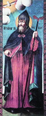 Портрет Григора Татеваци. Художник Овнатан Овнатанян. Конец XVIII века